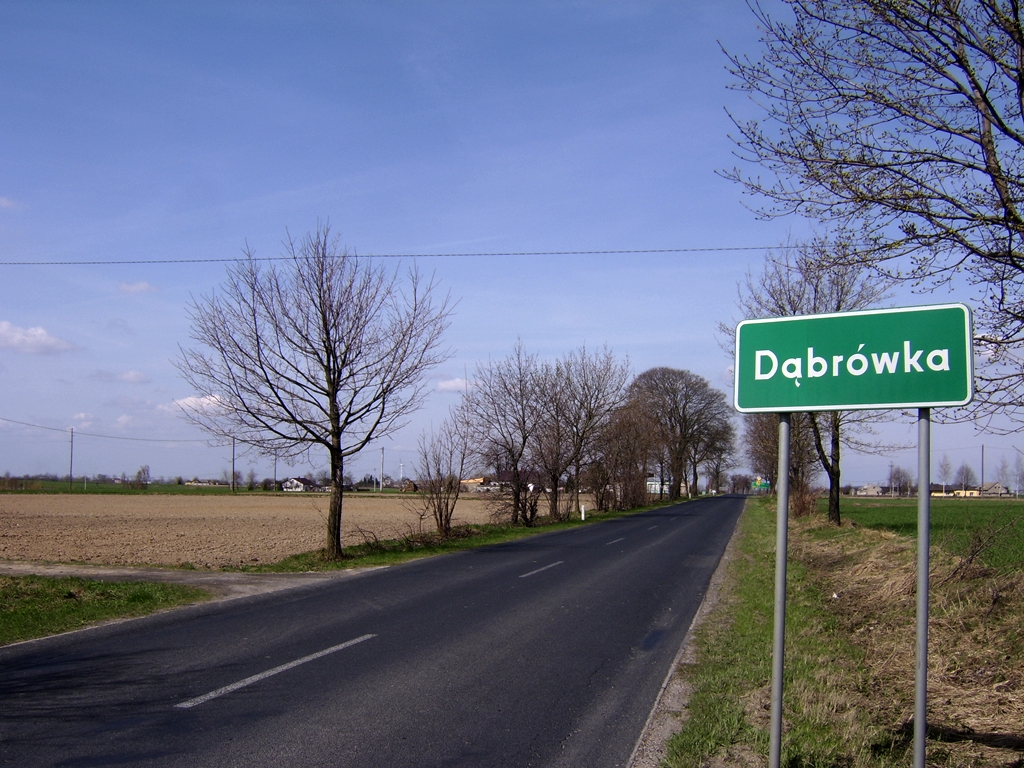 Wieś Dąbrówka